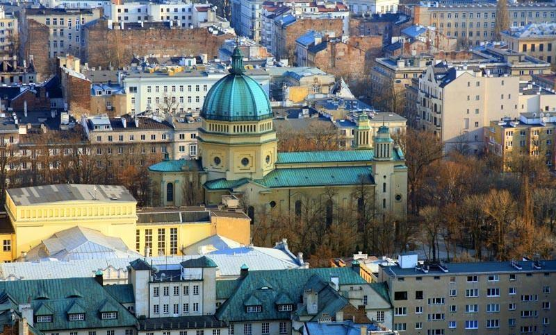 Warszawa (Polska)